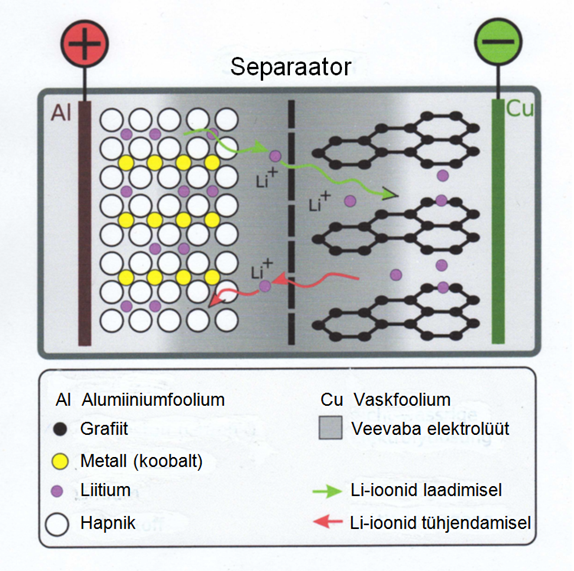 Liitiumioonaku ehituse ja talitluse skeem